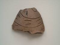 Schereb aus der Zeit der Linienbandkeramiker im Pfarreimuseum Greßthal